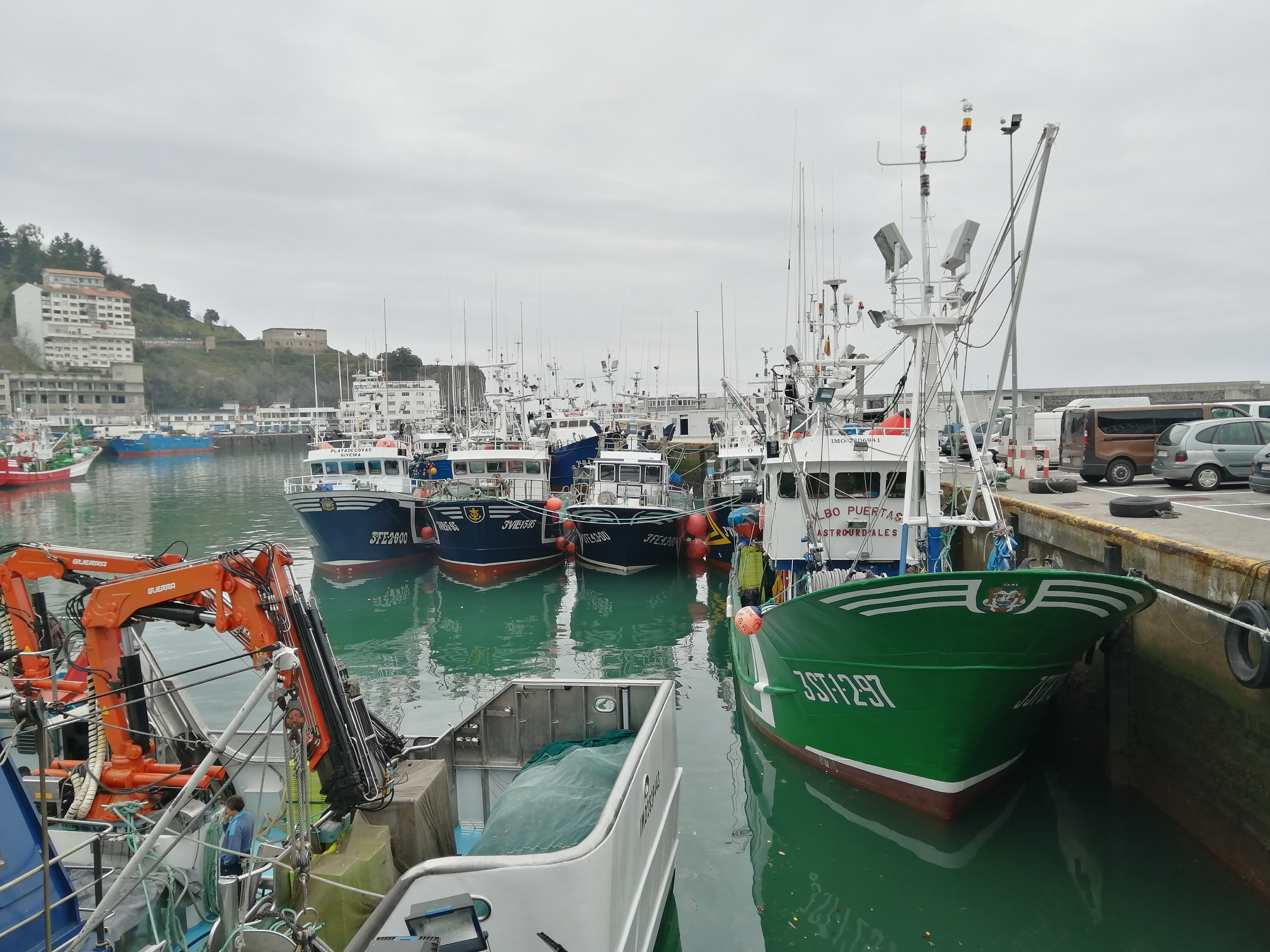 Txalupak Ondarroako portuan